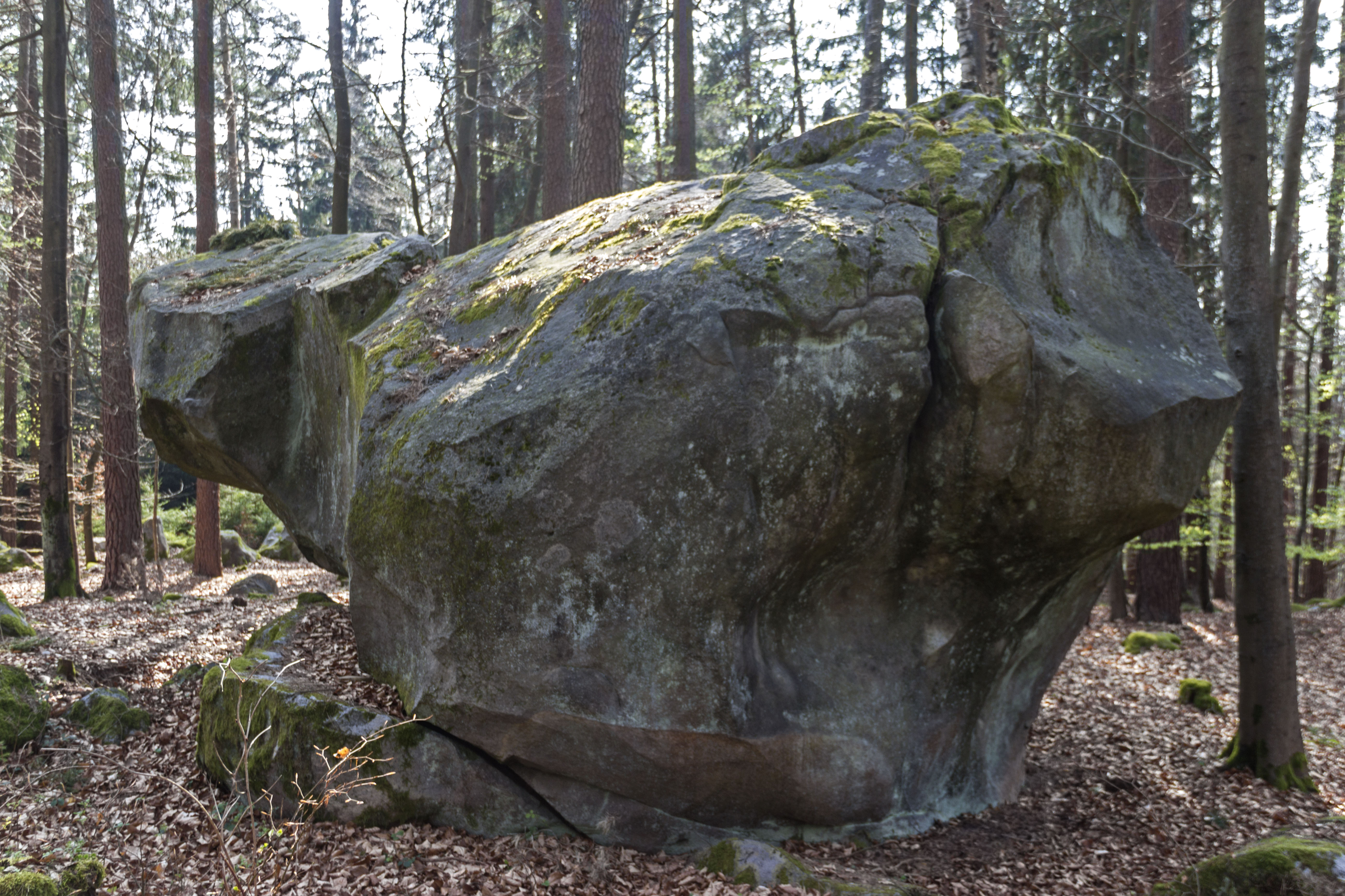 Kallmünzer, Zyprianstein, Geotop, Rinnenbrunn, Naturpark Fränkische Schweiz-Veldensteiner Forst